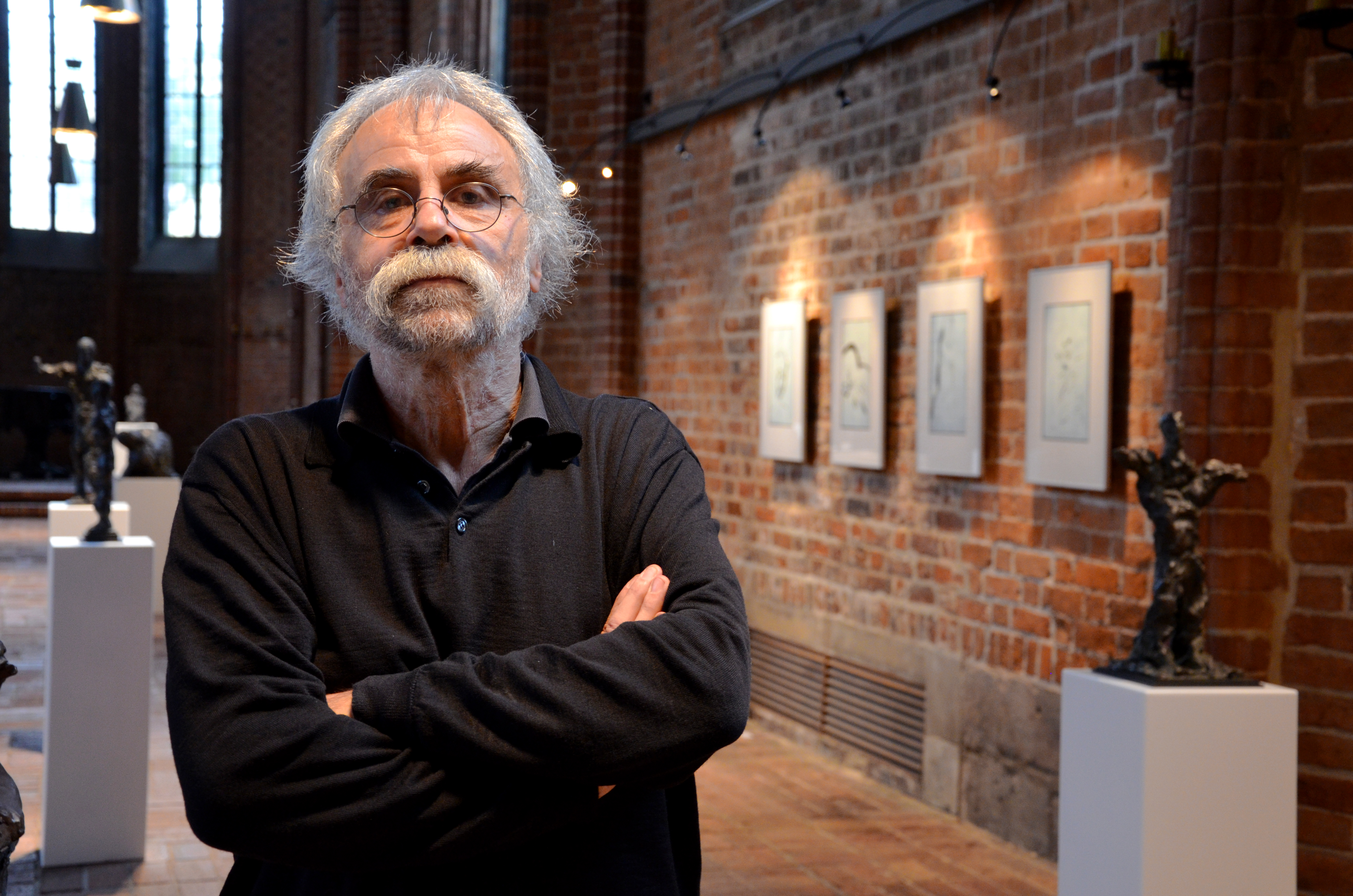 Der Künstler Peter Marggraf am Vortag zur Vernissage seiner Ausstellung „einmal nur ganz stille“ mit Bronzeplastiken und Drucken in der Marktkirche von Hannover vom 8. Oktober (Vernissage) bis 5. November 2014 ...